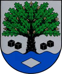 Gemeindewappen von Langenbach bei Kirburg